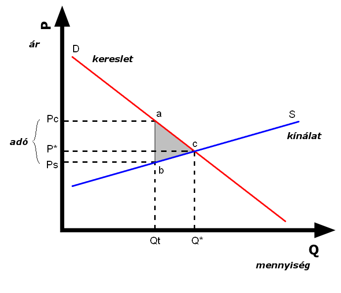 Adóék